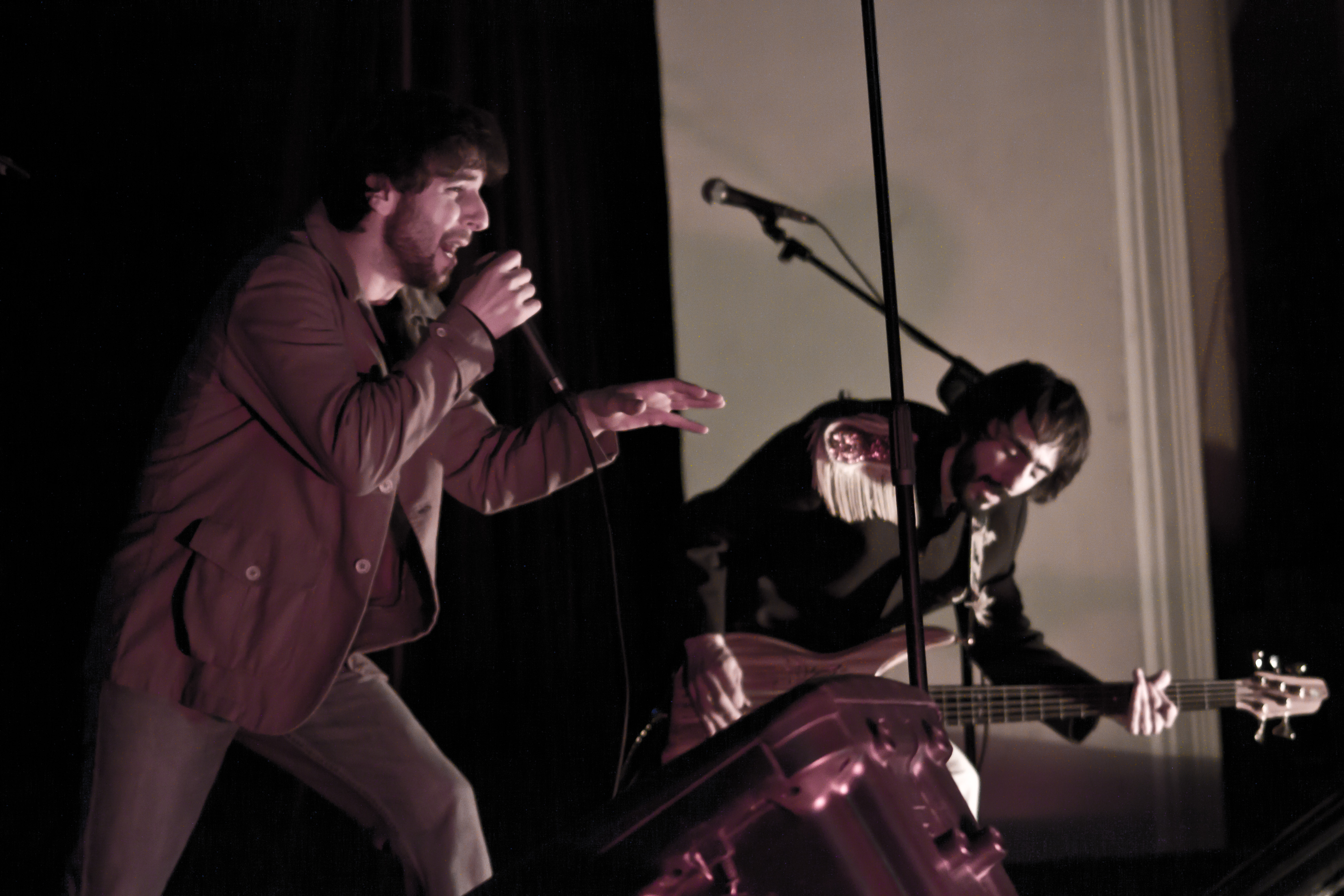 Որդան Կարմիր ռոք խումբ, Վահան Պողոսյան, Դավիթ Գալստյան